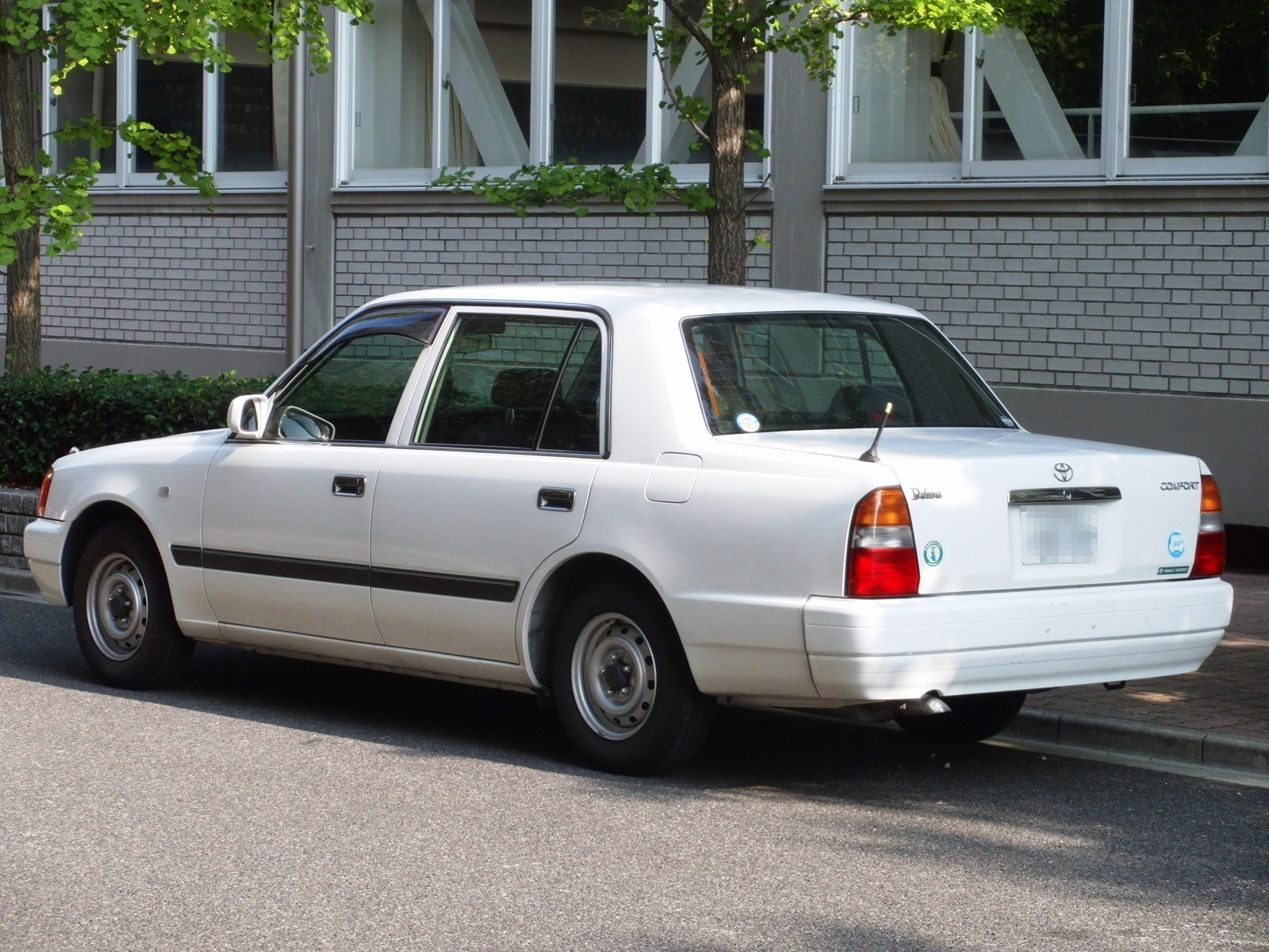 トヨタ・コンフォートの教習車仕様をリアから撮影